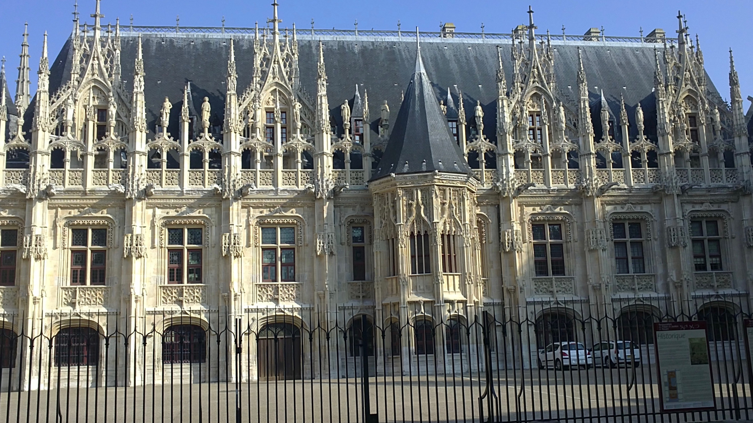 Cour du palais de justice de rouen, centre